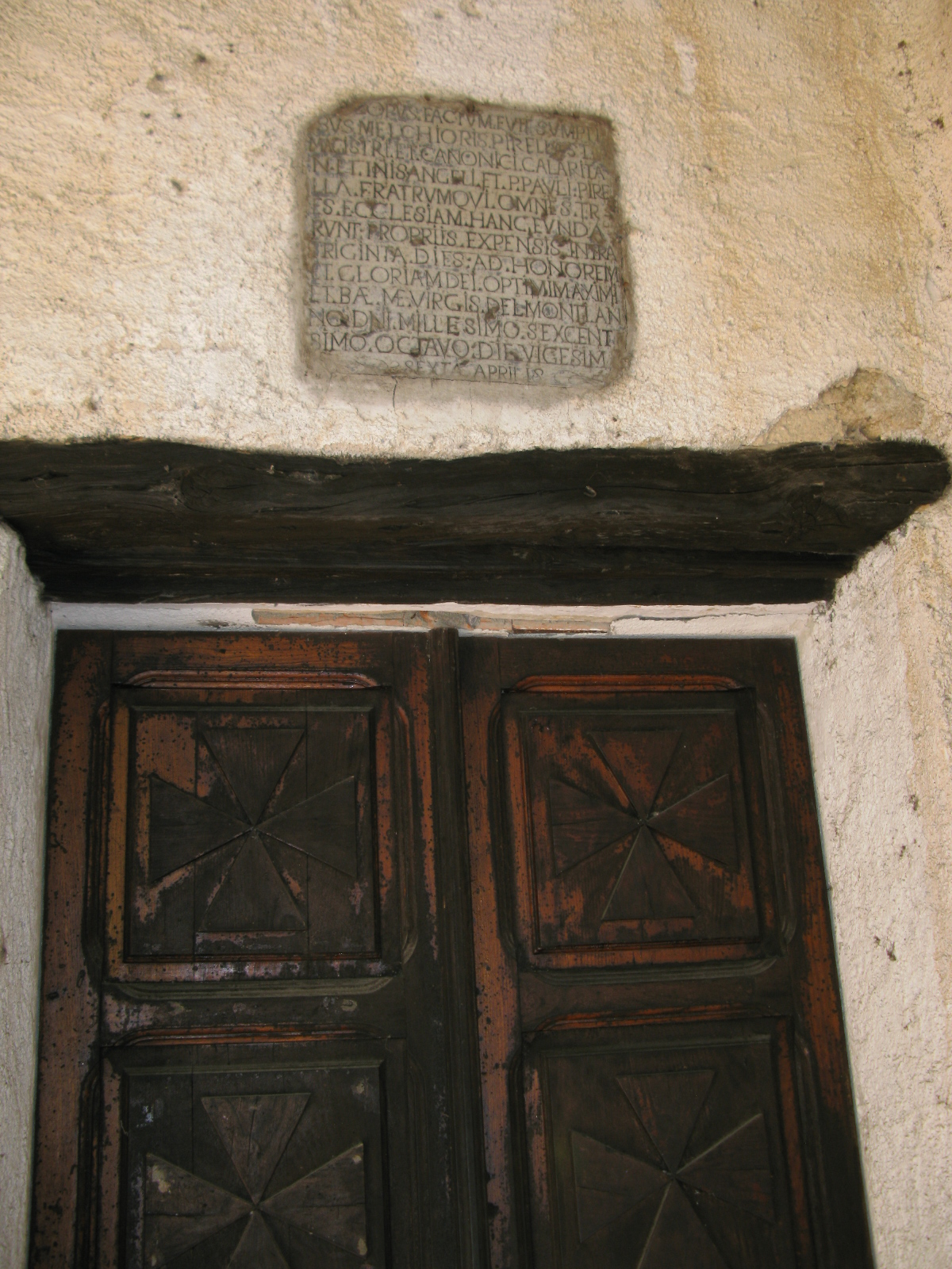 Lastra di dedica della Chiesa di N.S. del Monte Nero - 1608